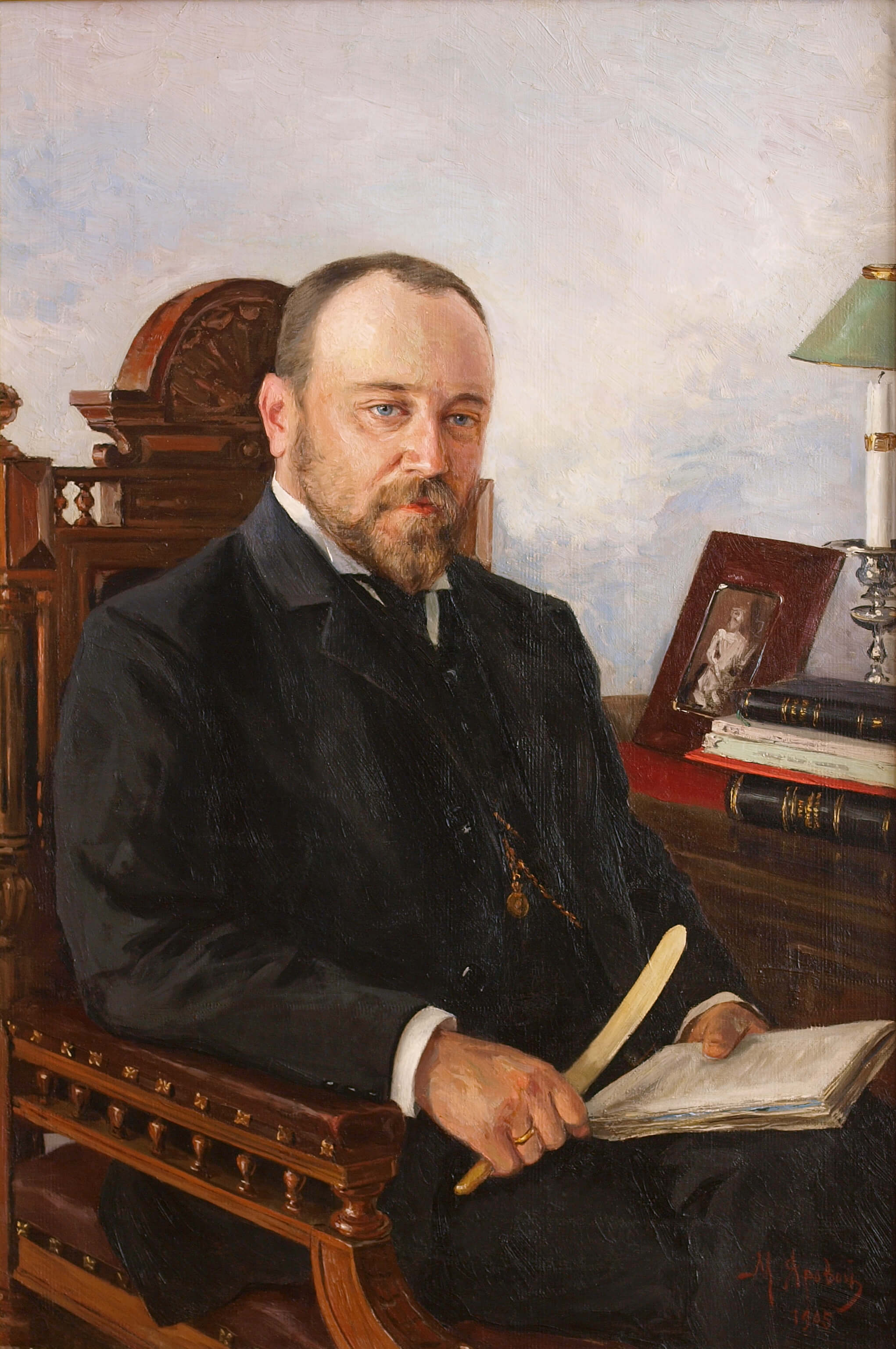 Портрет Рузского Николая Павловича. Художник Михаил Яровой.